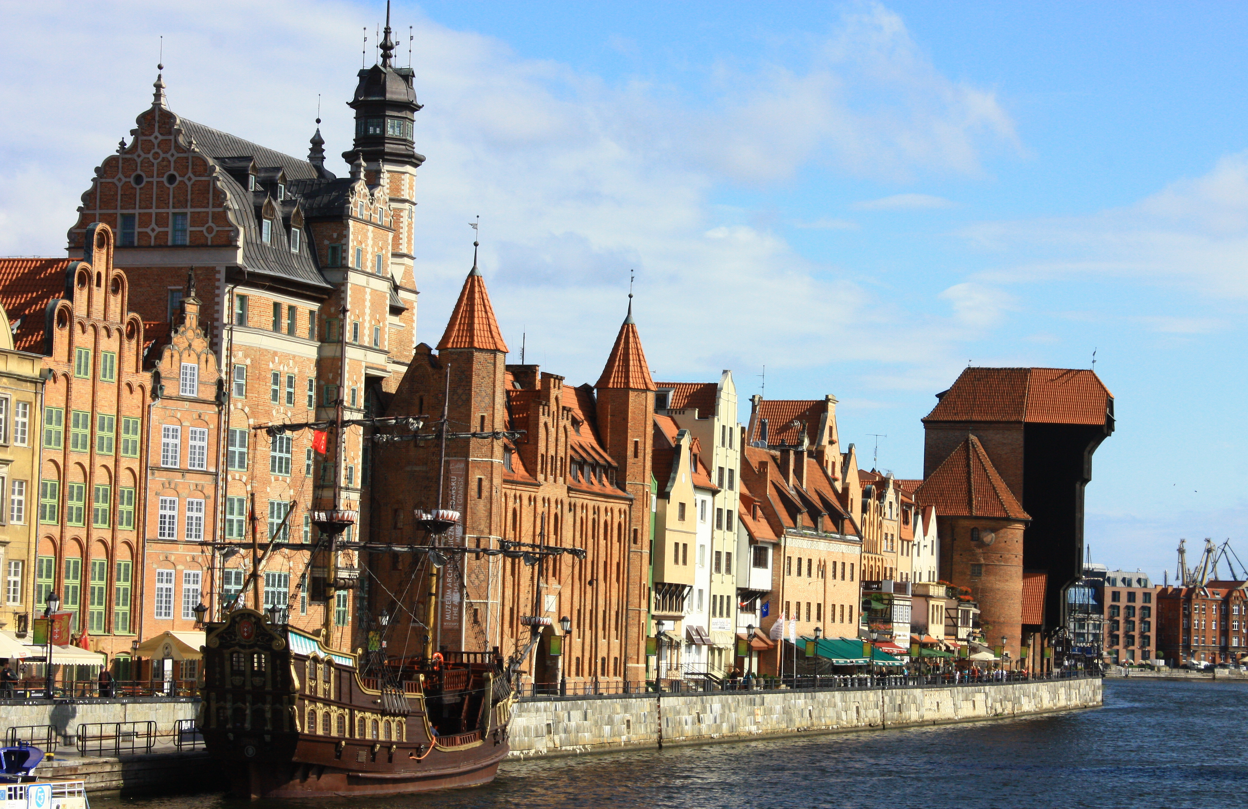 Gdańsk, Brama Mariacka, XIV, XVII